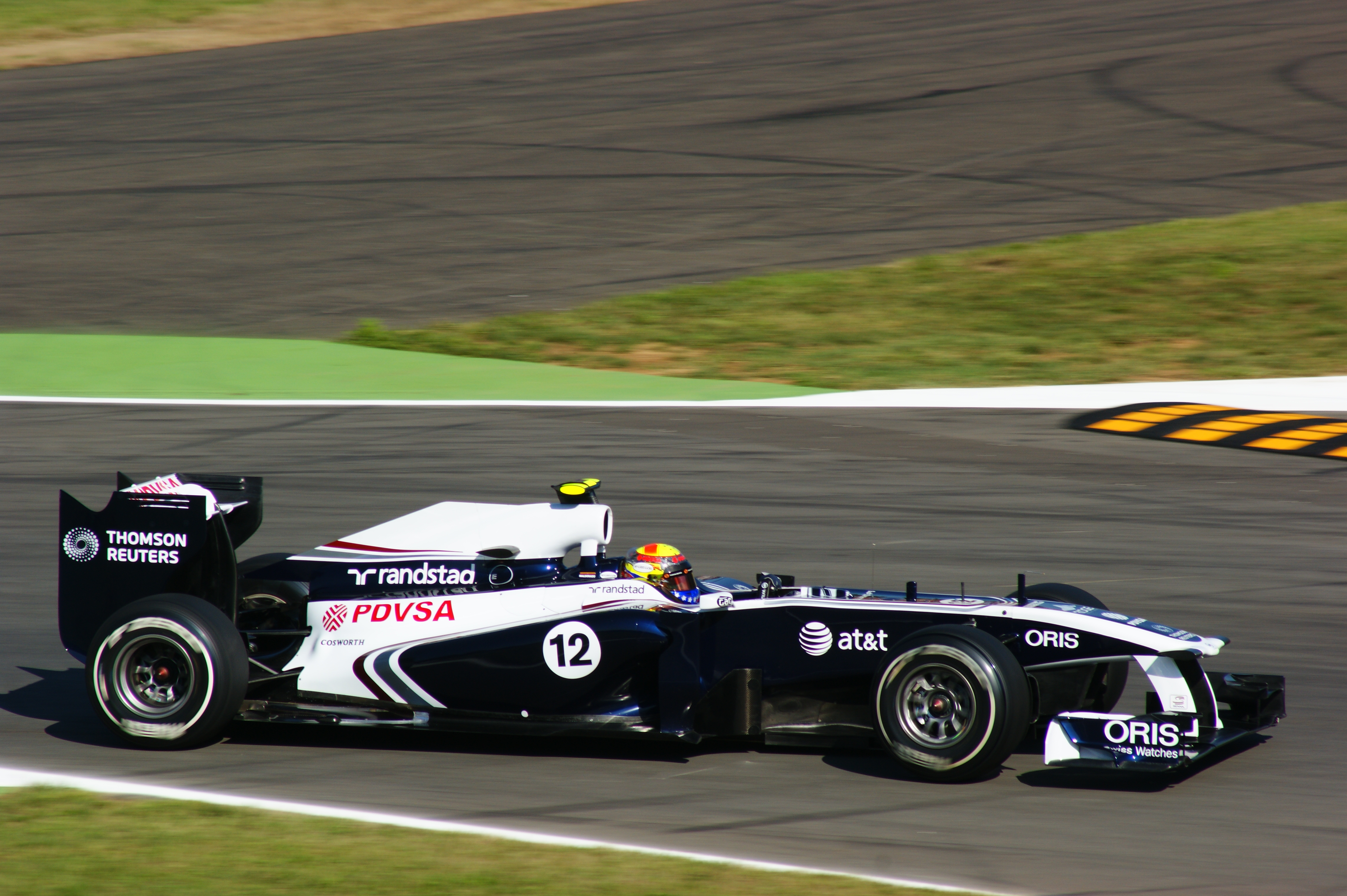 Pastor Maldonado alla prima variante Monza 2011